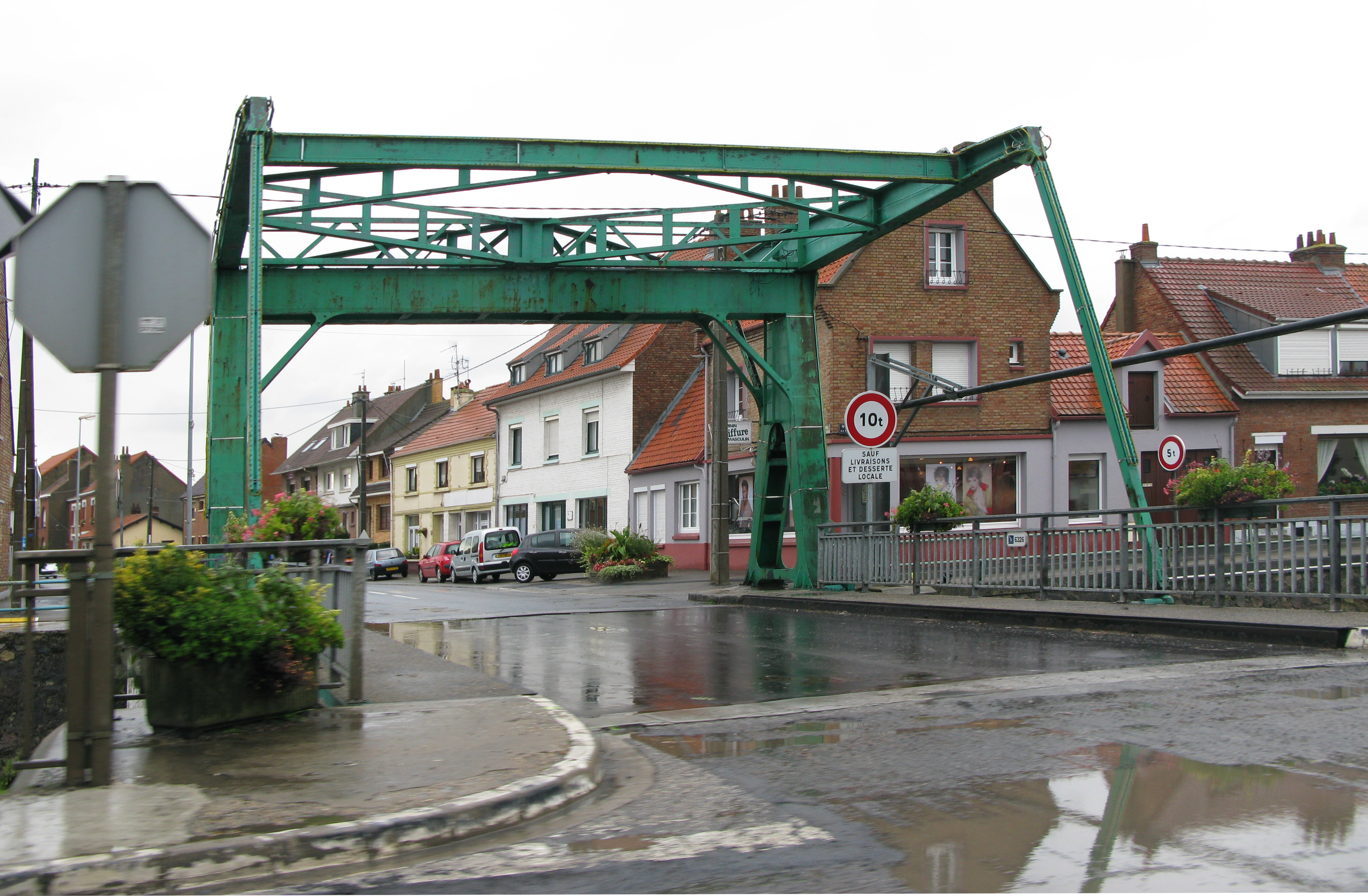 Le pont-levis du Grand-Millebrugghe, sur le canal de la Haute Colme.